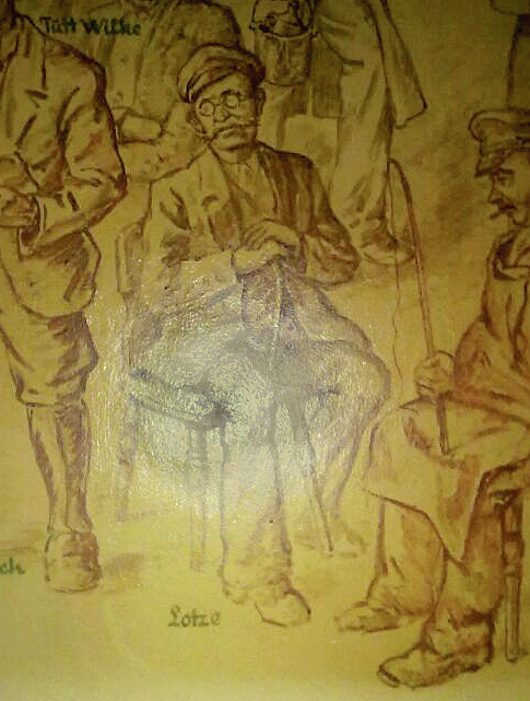 Wandzeichnung u.a.mit Wilhelm Lotze in der Louis Winkelmann Weinhandlung in Münden.